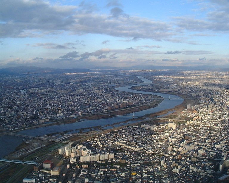 淀川を大阪市都島区上空から撮影。橋は手前2番目から城東貨物線赤川鉄橋、菅原城北大橋、豊里大橋。